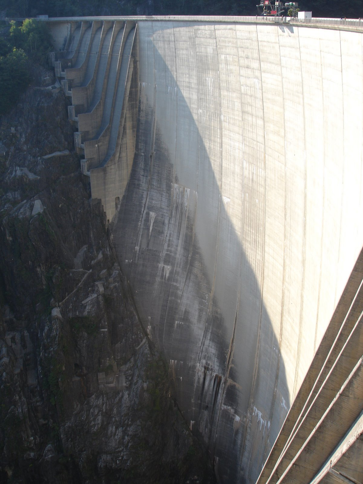 Vu de près sur la Barrage de Contra en Suisse